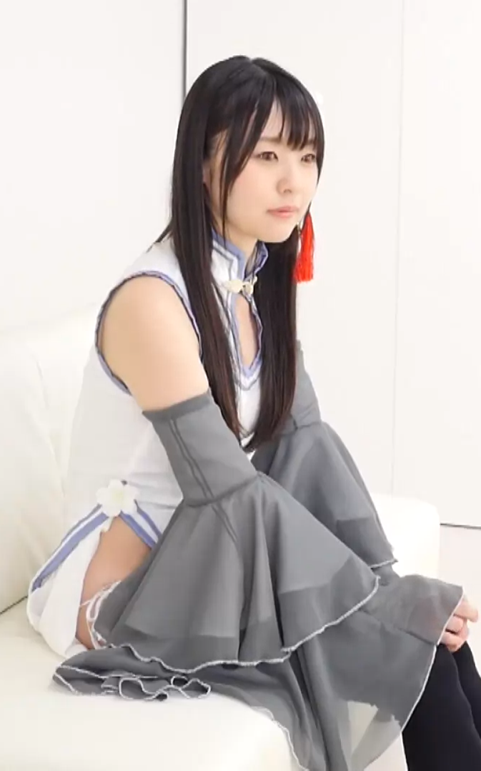 コスホリ用編集中 つぼみさん